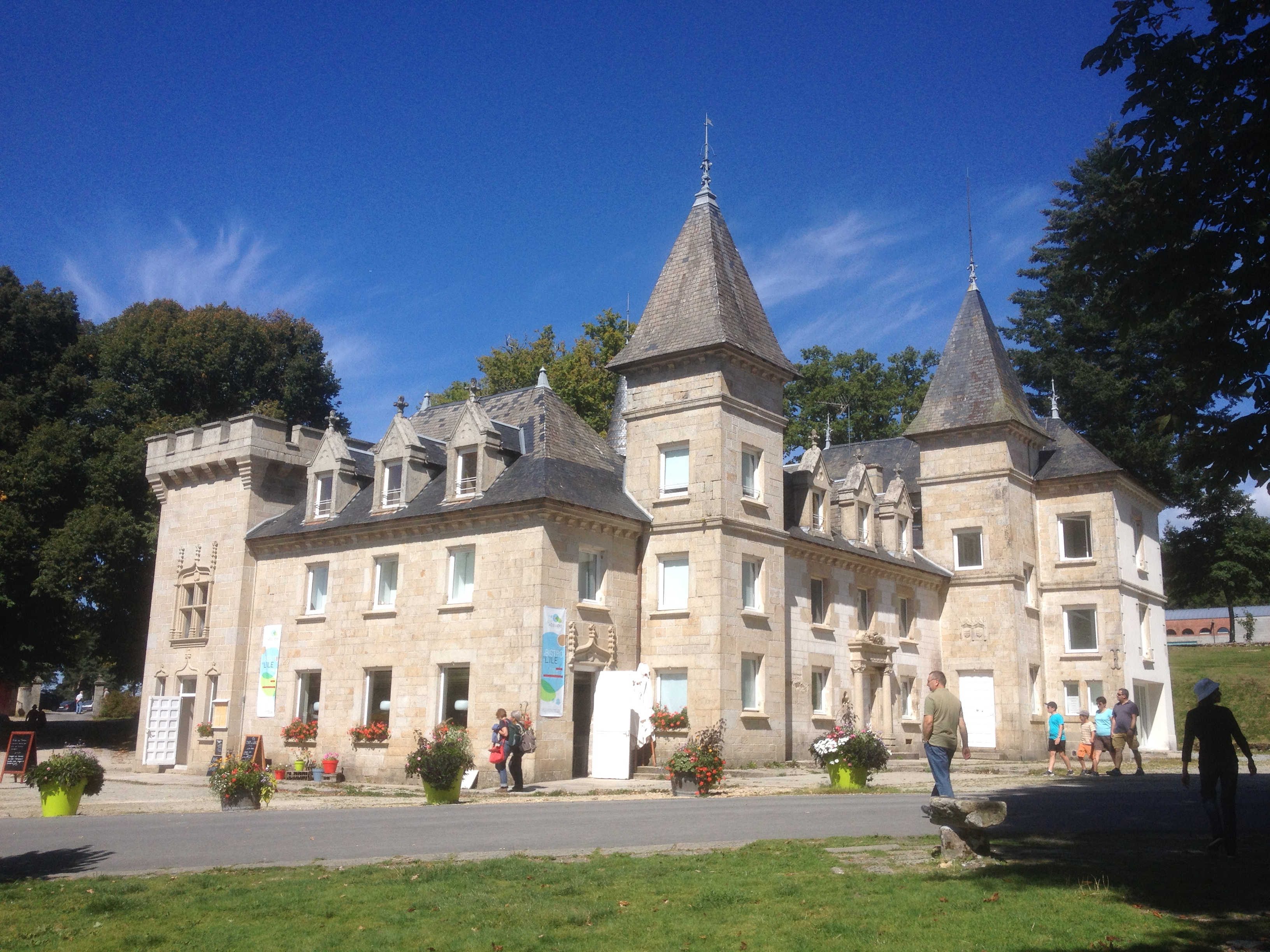 Le château de Beaumont-du-Lac, sur l'île de Vassivière.